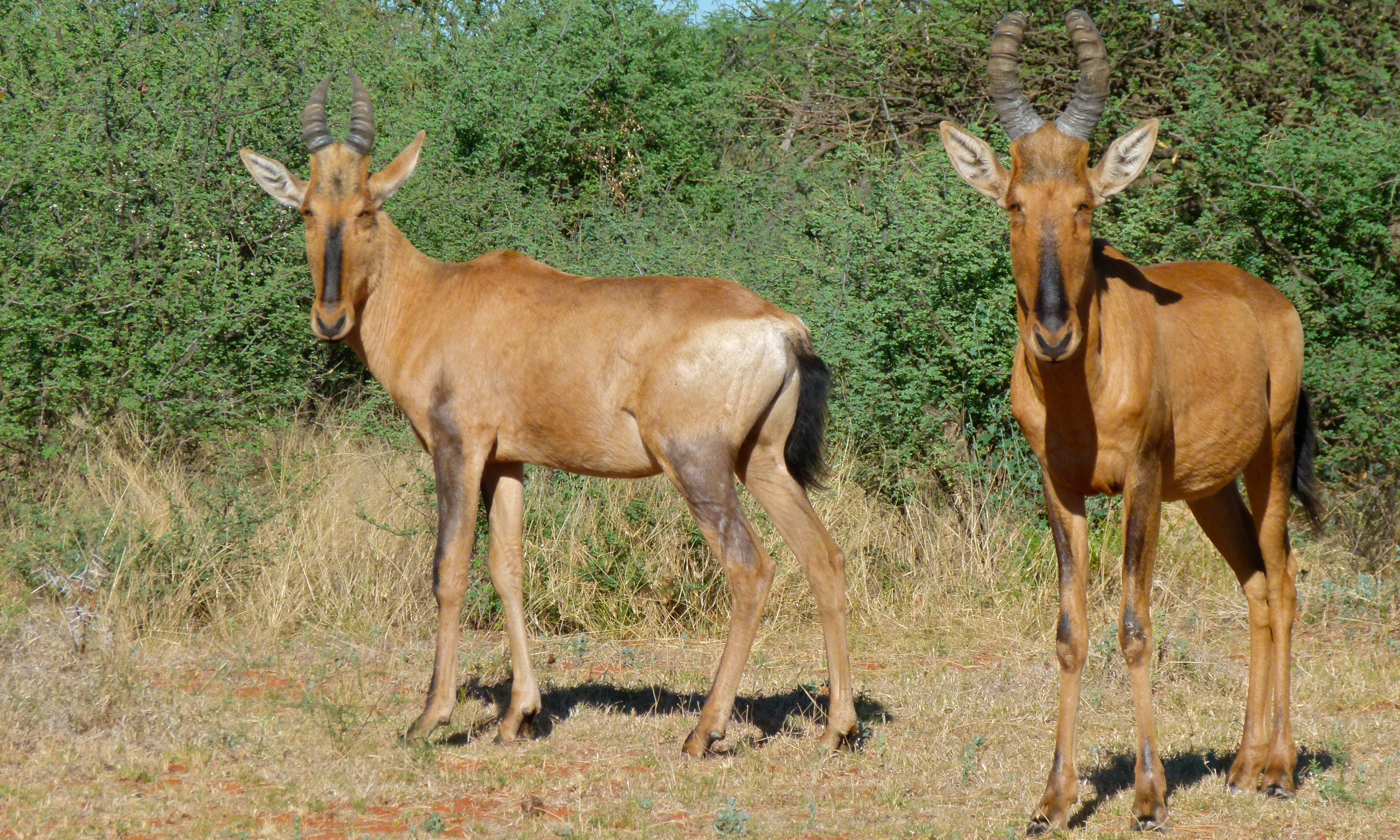 Stofdam Bird Hide, Mokala NP, SOUTH AFRICA